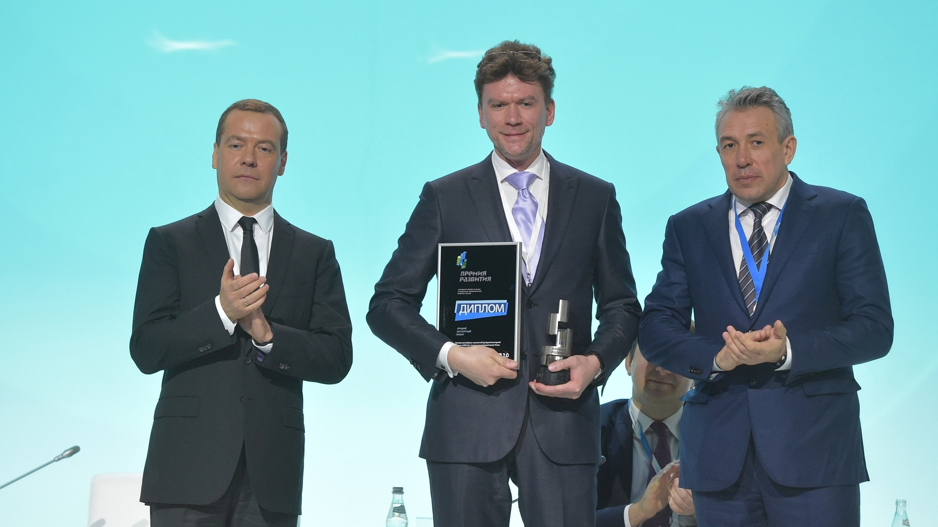 Генеральный директор ОАО «Т-Платформы» Всеволод Юрьевич Опанасенко получает награду в конкурсе «Премия развития» в номинации «Лучший проект в отраслях промышленности» за то, что в ОАО «Т-Платформы» началось промышленное производство отечественного высокопроизводительного энергоэффективного процессора «Байкал». Слева премьер-министр Дмитрий Анатольевич Медведев, в середине Всеволод Юрьевич Опанасенко, справа председатель «Внешэкономбанка» Сергей Николаевич Горьков. Церемония награждения лауреатов конкурса «Премия развития». Город Сочи, Олимпийский парк.